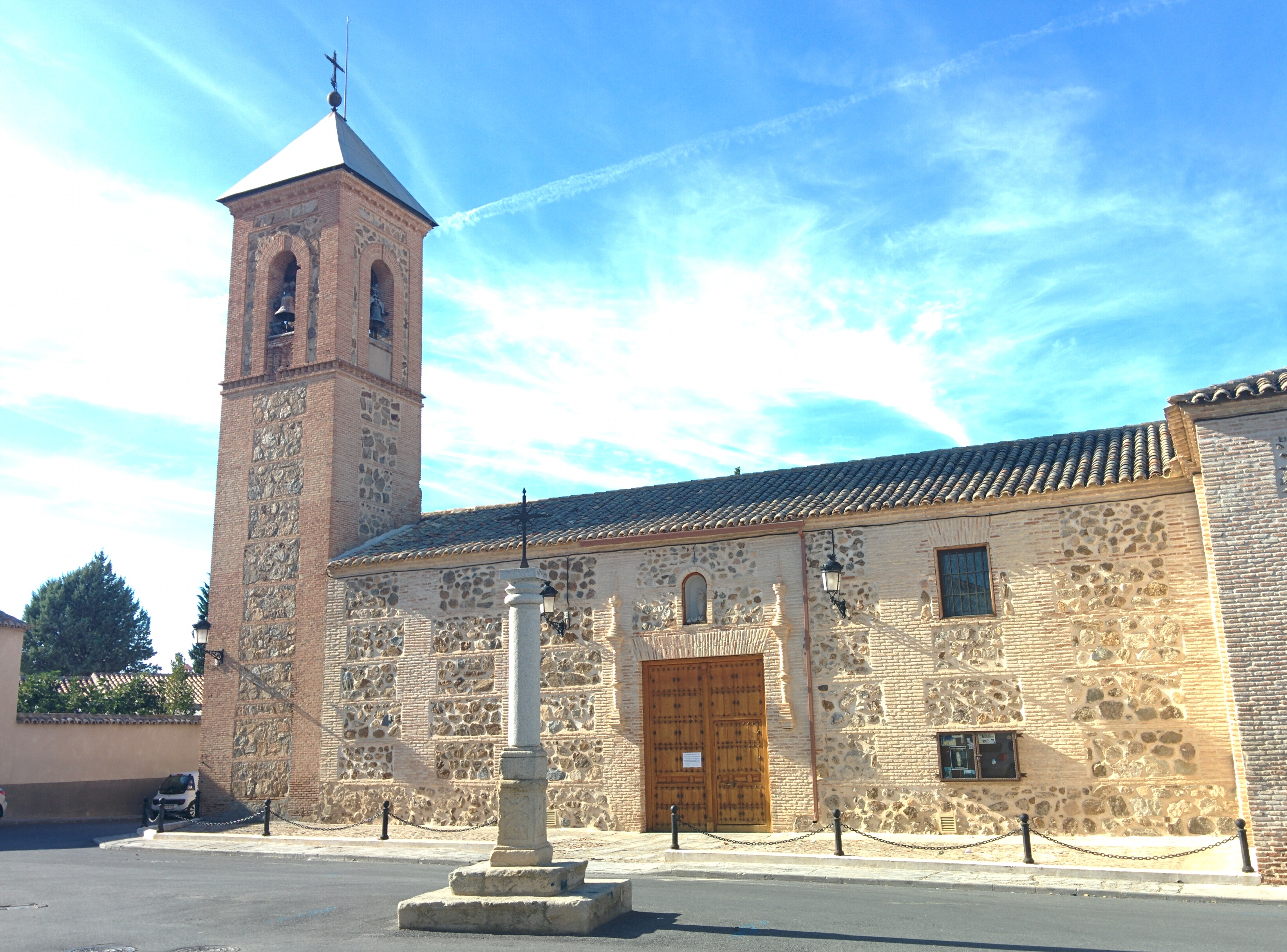 Iglesia de Nuestra Señora de la Purificación, en Nambroca (Toledo, España).